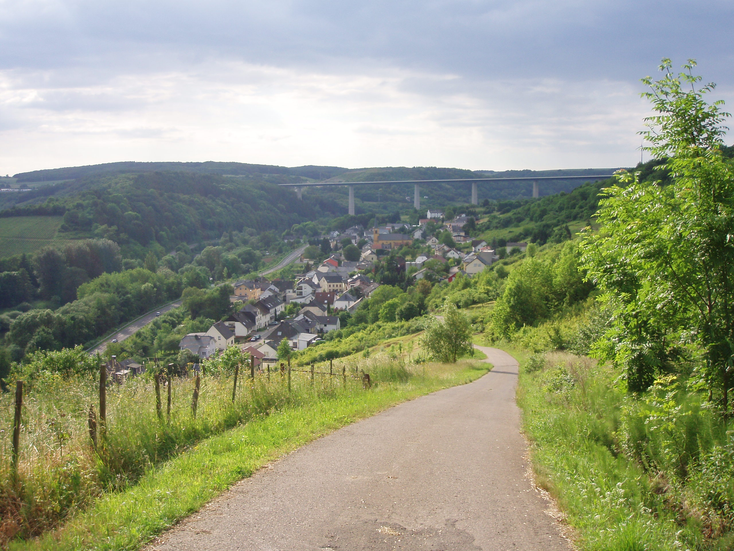 Blick über Mesenich